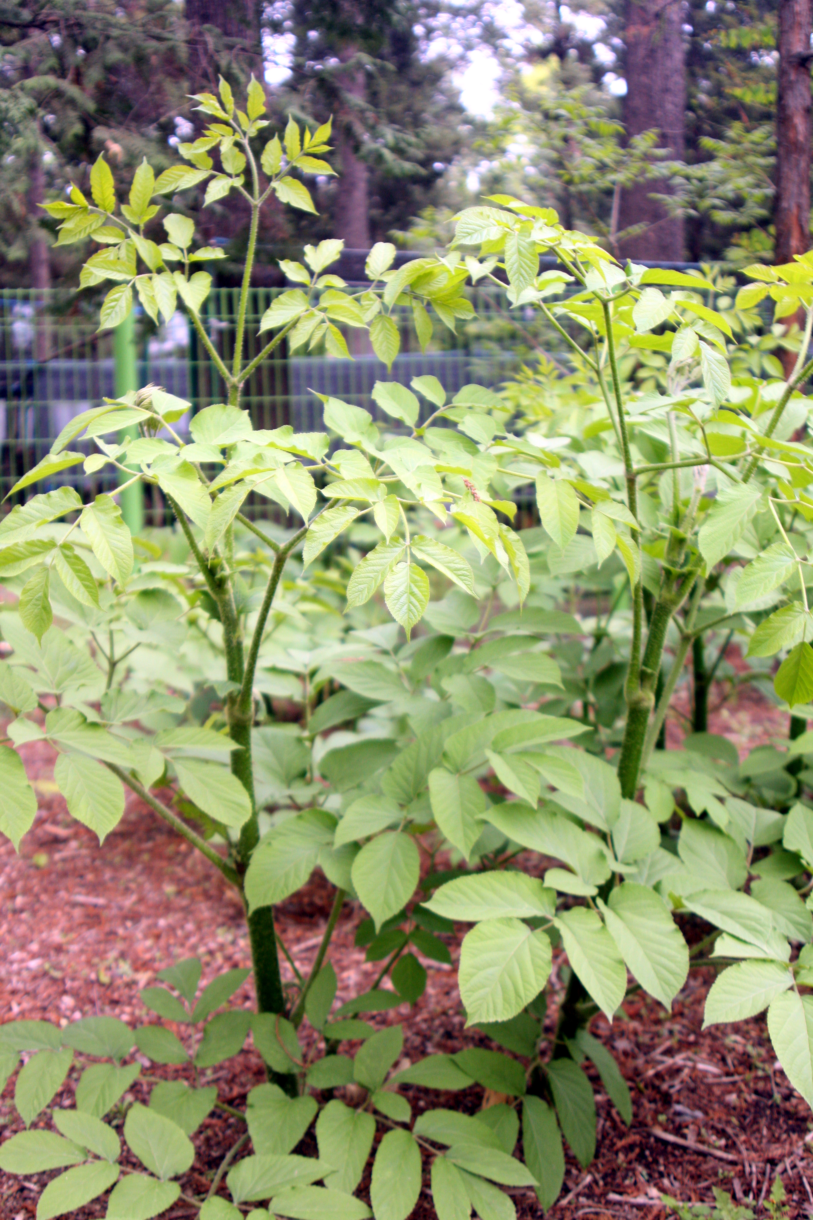 독활, 홍릉수목원